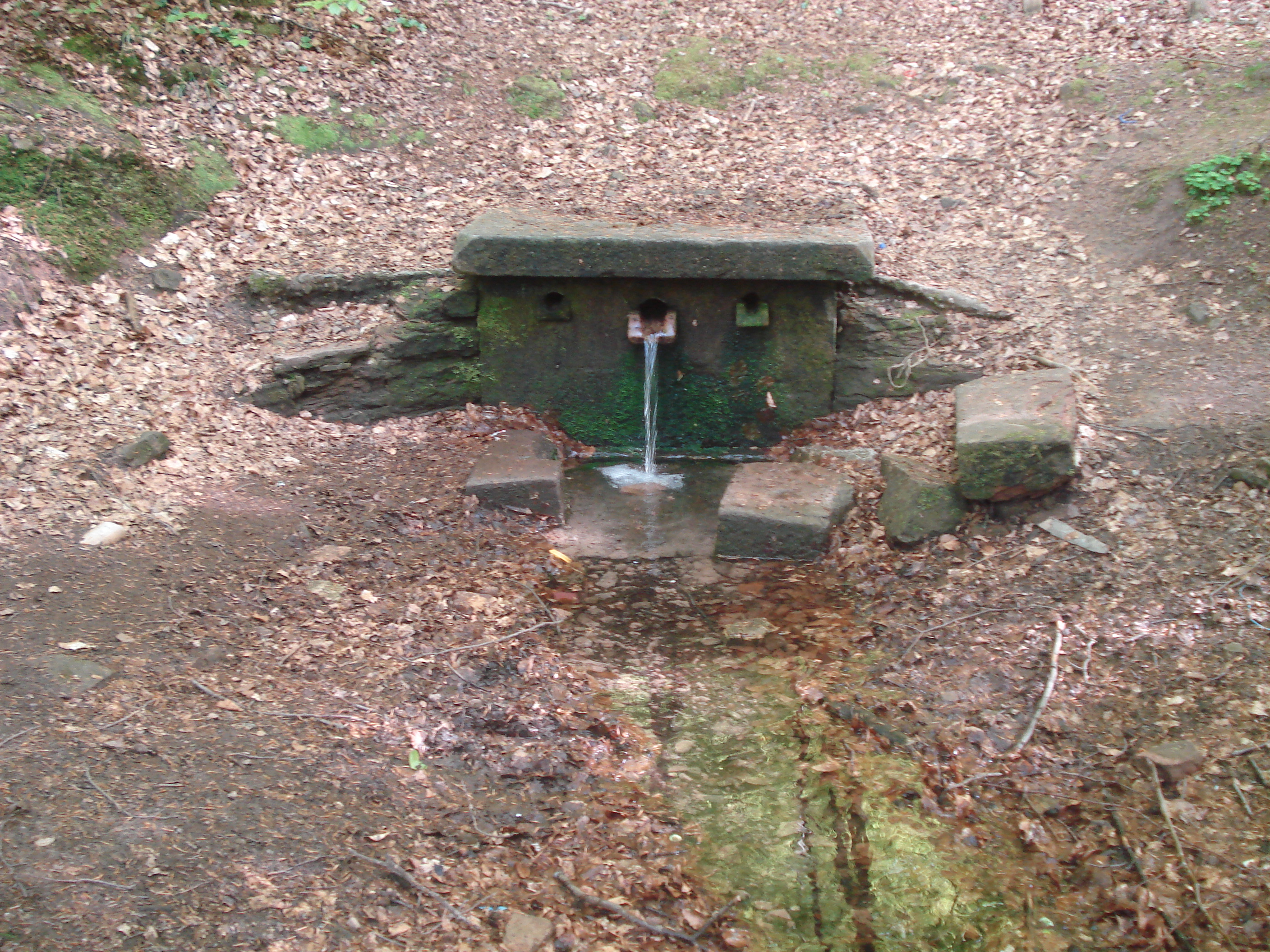 Der Heinrichsbrunnen oder die Heinrichsquelle. Der abfließende Bach mündet in den Rohrwiesenbach